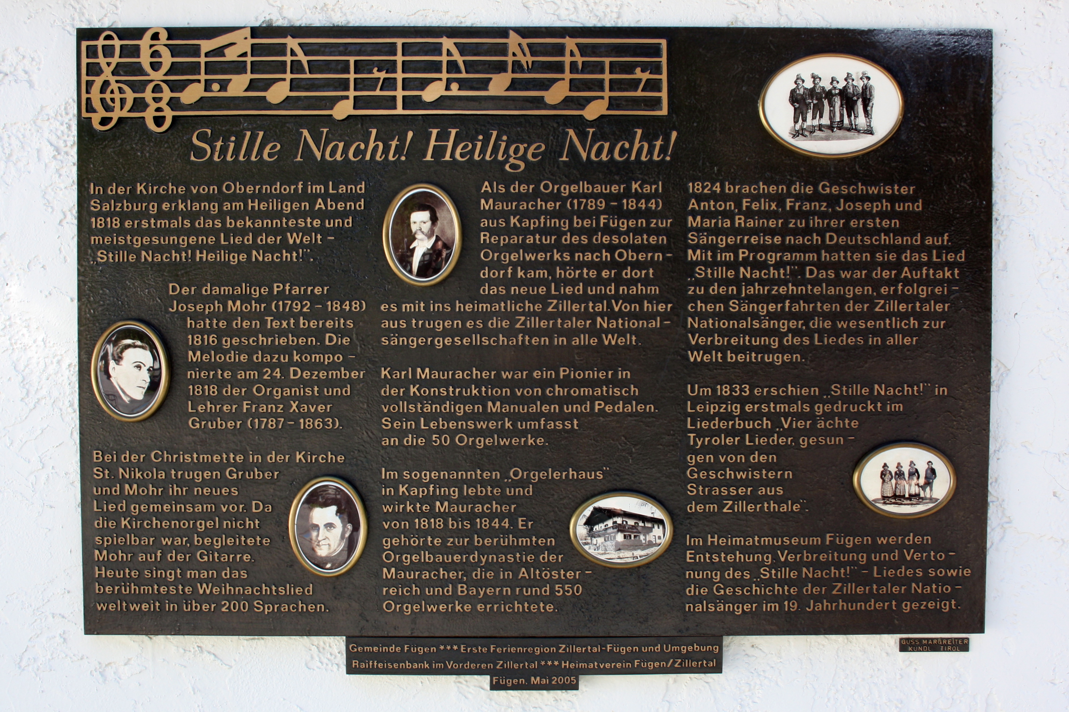 Stille-Nacht-Gedenktafel am Heimatmuseum in der Widumspfiste in Fügen (Zillertal).